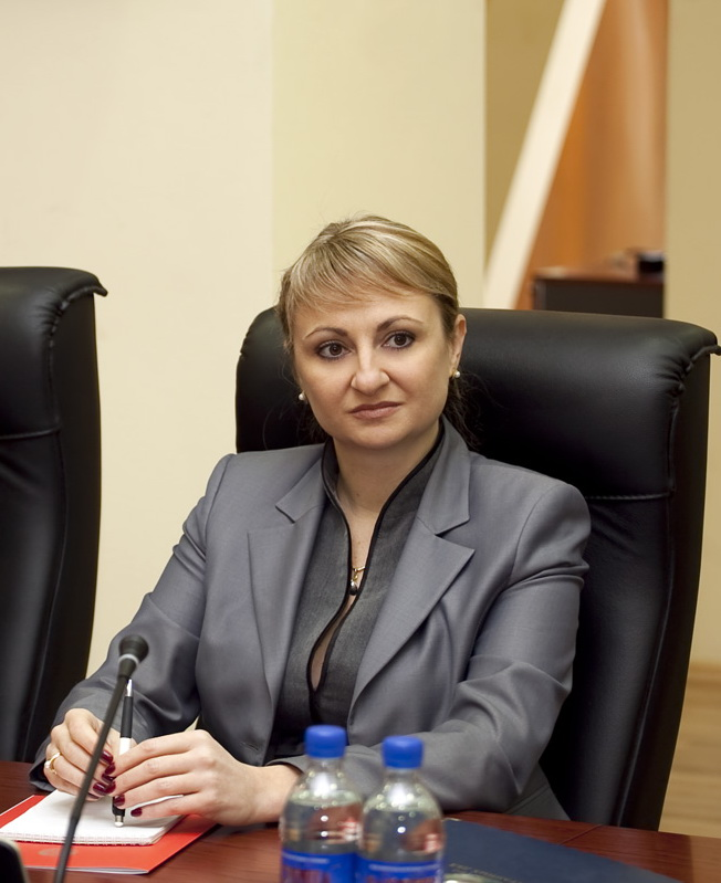 Майя Ивановна Парнас - Заместитель Председателя Правительства Приднестровской Молдавской Республики, Министр экономического развития ПМР